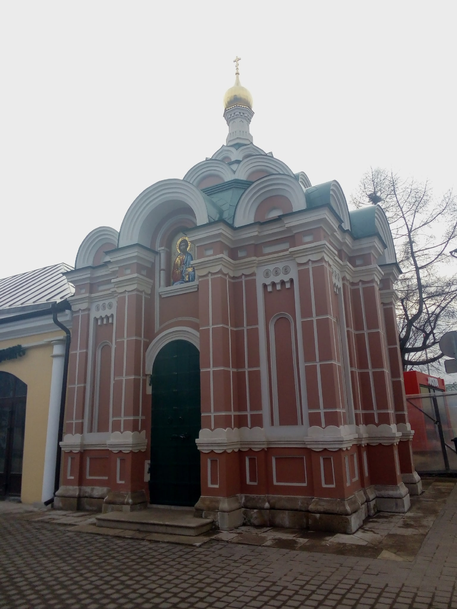 Часовня Покровской церкови (Тула), после реставрации.